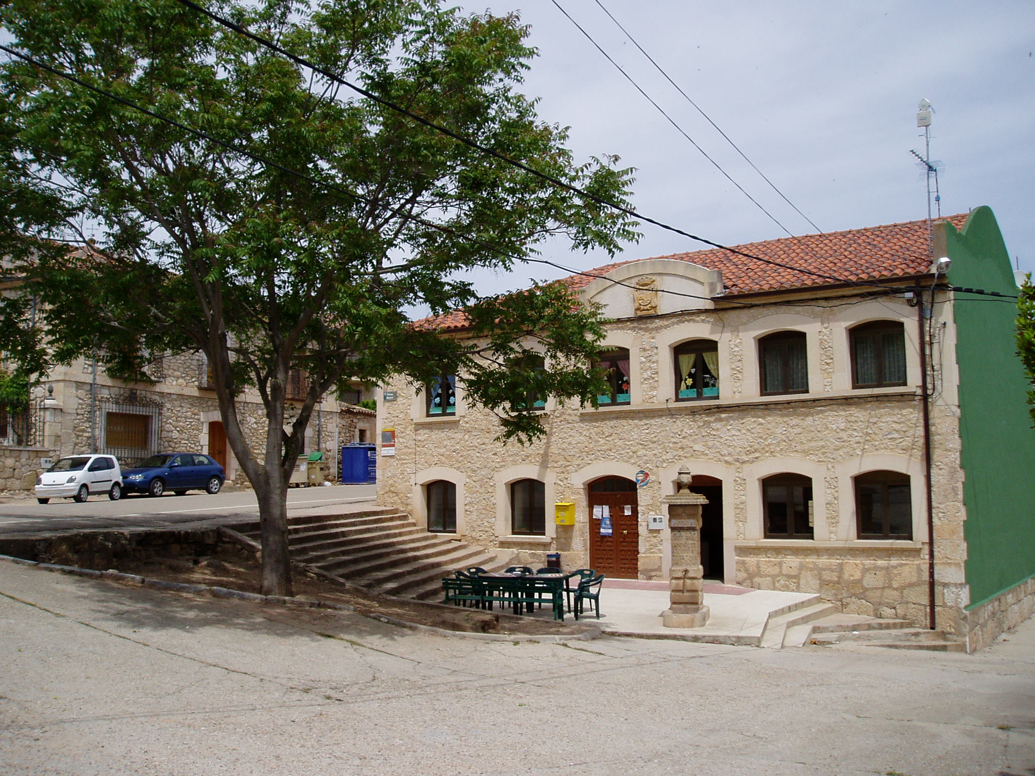 Pardilla: plaza y ayuntamiento